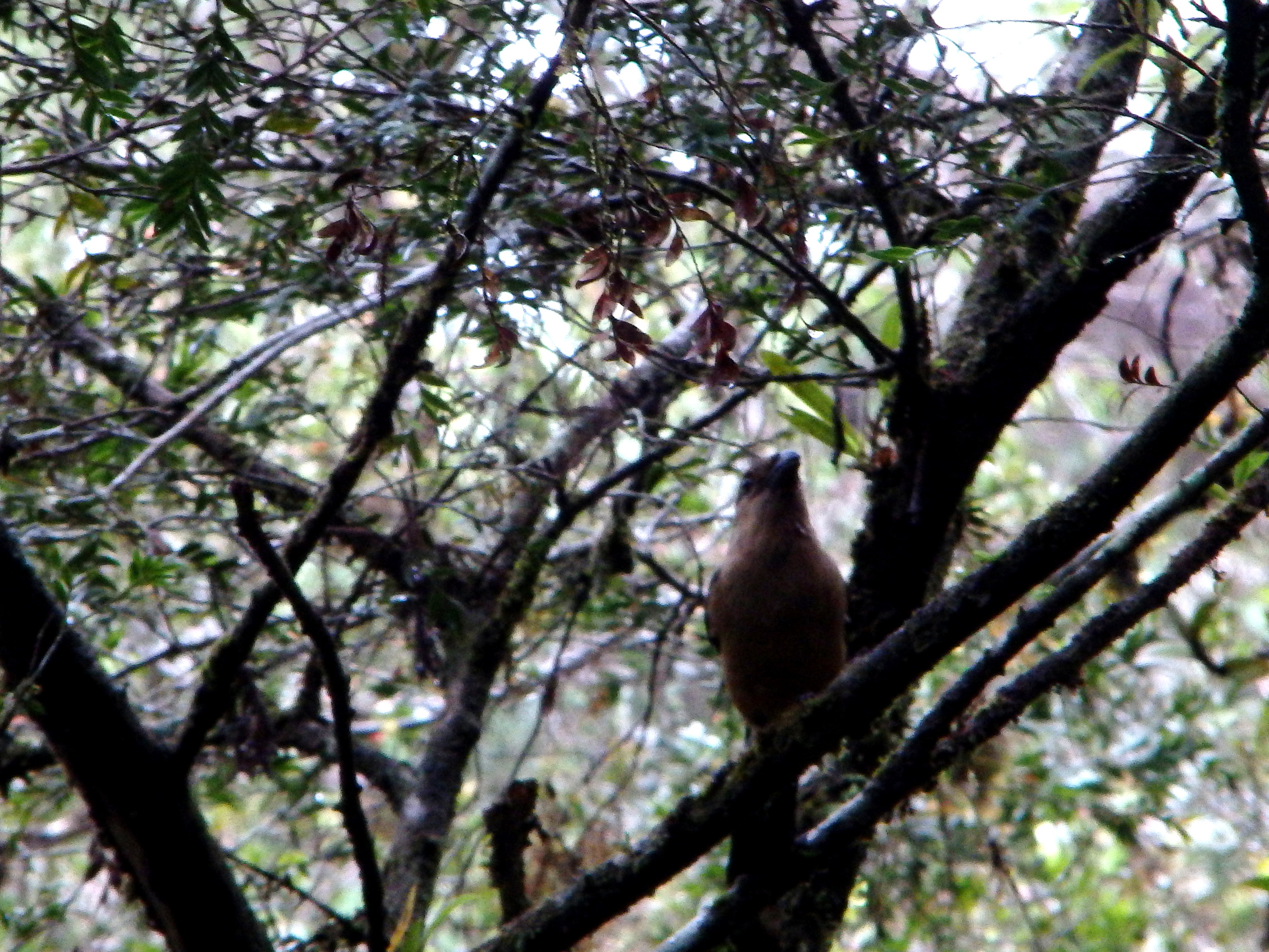 Kinabalu Park, Ranau, Sabah, Malaysia